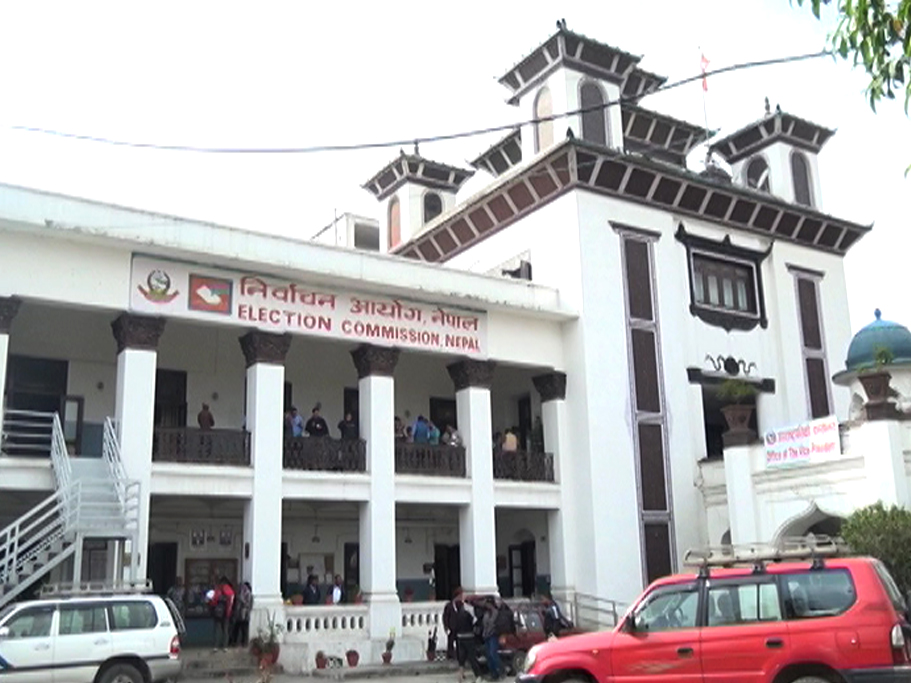 नेपाली: निर्वाचन आयोग (नेपाल)